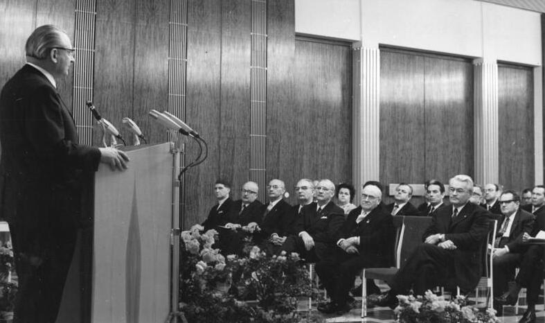 Zentralbild Franke 8.2.71 Berlin: Präsidiumstagung des CDU-Haupvorstandes Das Miteinander von Christen und Marxisten in der DDR un die Bewährung und Verantwortung der christlichen Bürger in der sozialistischen Menschengemeinschaft standen im Mittelpunkt einer Präsidiumstagung des CDU-Hauptvorstandes am 8.2.71 in Berlin. Anlaß der Beratung ist der 10. Jahrstag der Begegnung zwischen dem Vorsitzenden des Staatsrates der DDR, Walter Ulbricht, und einer Delegation christlicher Persönlichkeiten am 9.2.61 in Berlin. Herzlich begrüßter Gast war das Mitglied des Politbüros und Sekretär des ZK der SED, Paul Verner (am Pult). In der ersten Reihe v.l.n.r.: Das Mitglied des Staatsrates der DDR Friedrich Kind; Oberkirchenrat Dr. [Gerhard] Lotz; Luitpold Steidle; Mitglied des Hauptvorstandes der CDU; der Staatssekretär für Kirchenfragen, Hans Seigewasser; der Minister für Gesundheitswesen der DDR, Max Sefrin; der amtierende thüringische Landesbischof D Dr. Moritz Mitzenheim und der Vorsitzende der CDU, Gerald Götting.